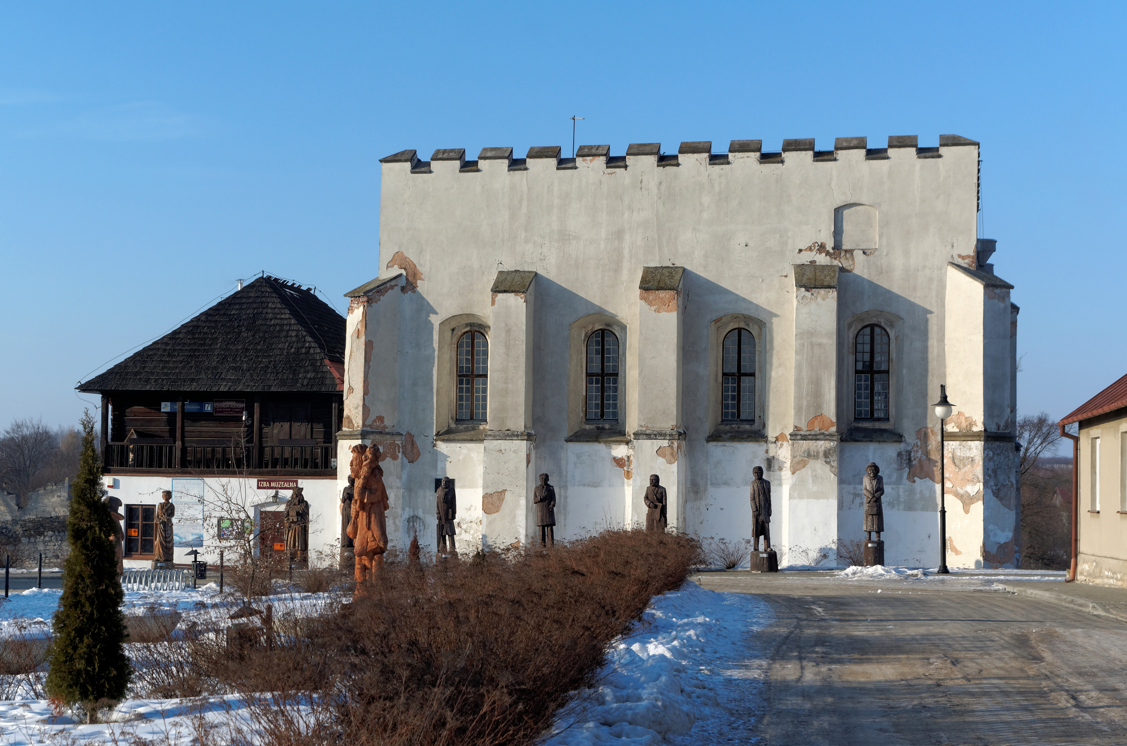 Szydłów - synagoga, obecnie dom kultury, pocz. XVI, XVII w., lata 1970-1980